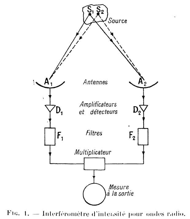 Schéma simplifié du principe d'interférométrie d'intensité théorisé par R. Hanbury Brown en 1959. Une source émettrice (ici S1 et S2) est détectée par deux amplificateurs; les données provenant de cette source sont amplifiées et la fréquence obtenue est filtrée. Ceci permet notamment l'obtention de méta-données temporelles, ce qui permet de reconstituer la localisation de la source à un instant T plus finement. Cette technique est appelée: interférométrie à post-détection.